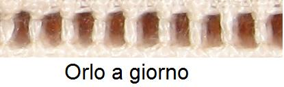 ricamo